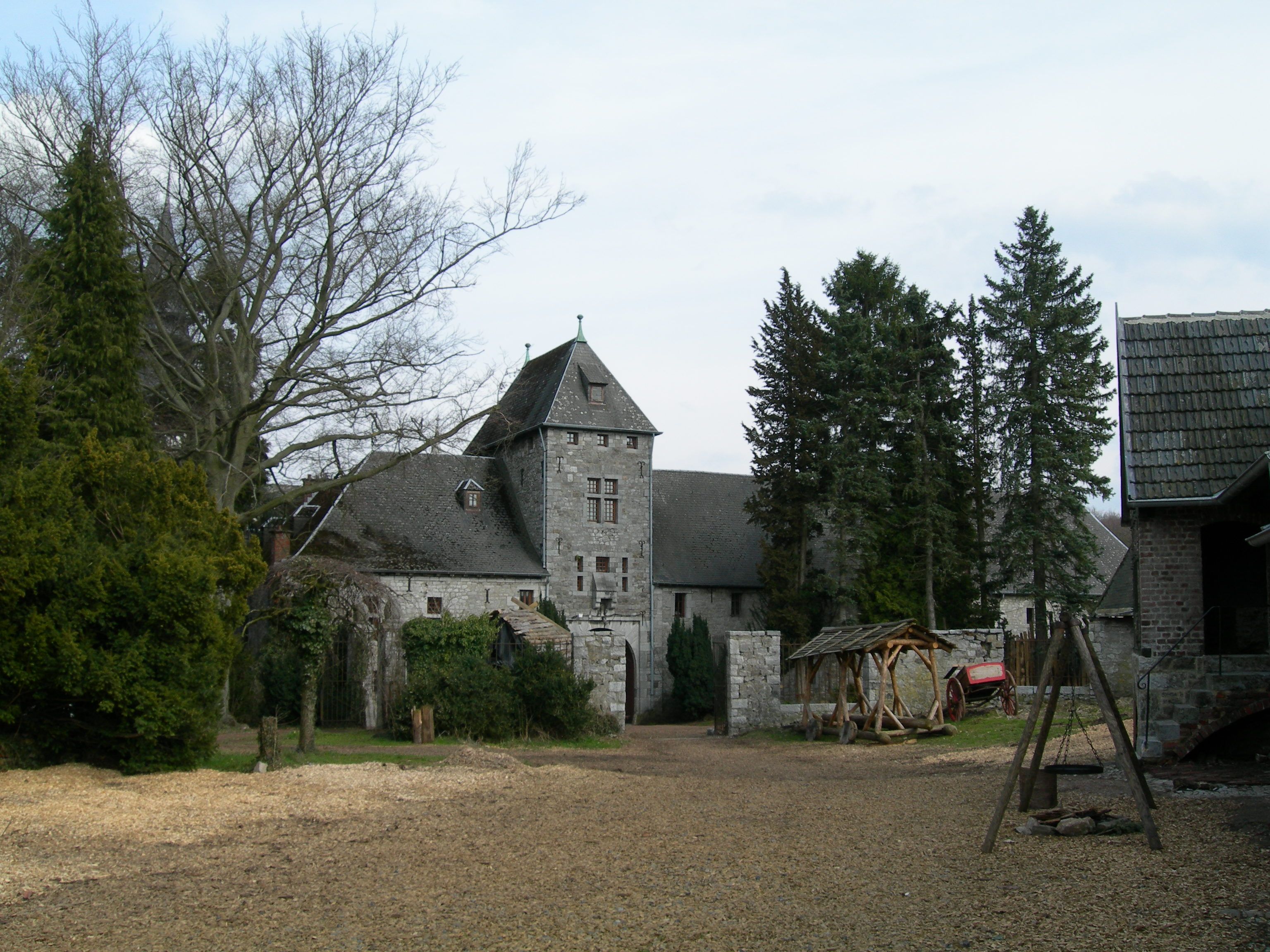 Eyneburg bei Hergenrath (B)